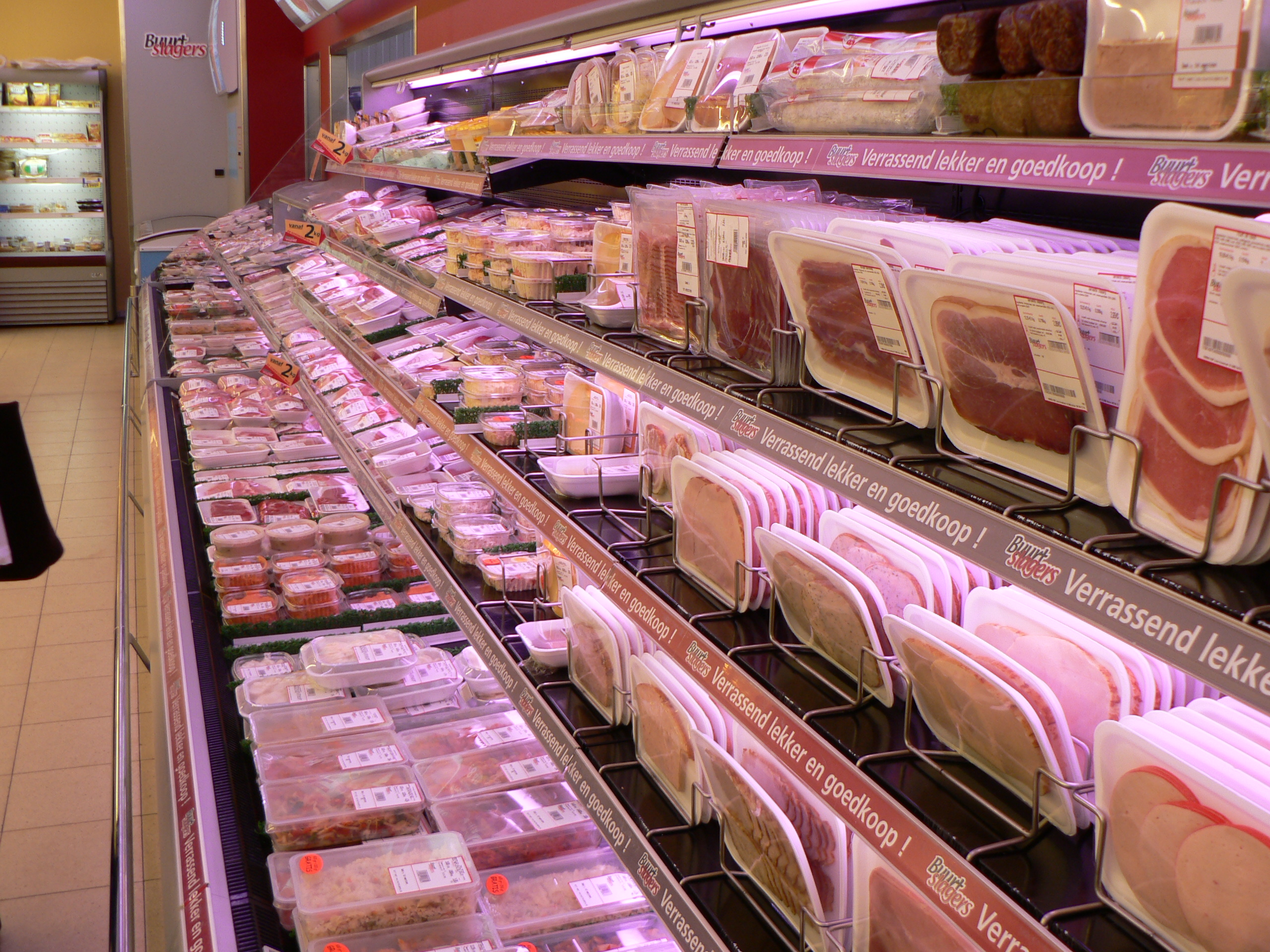 Smatch supermarket, Deerlijk, Belgium